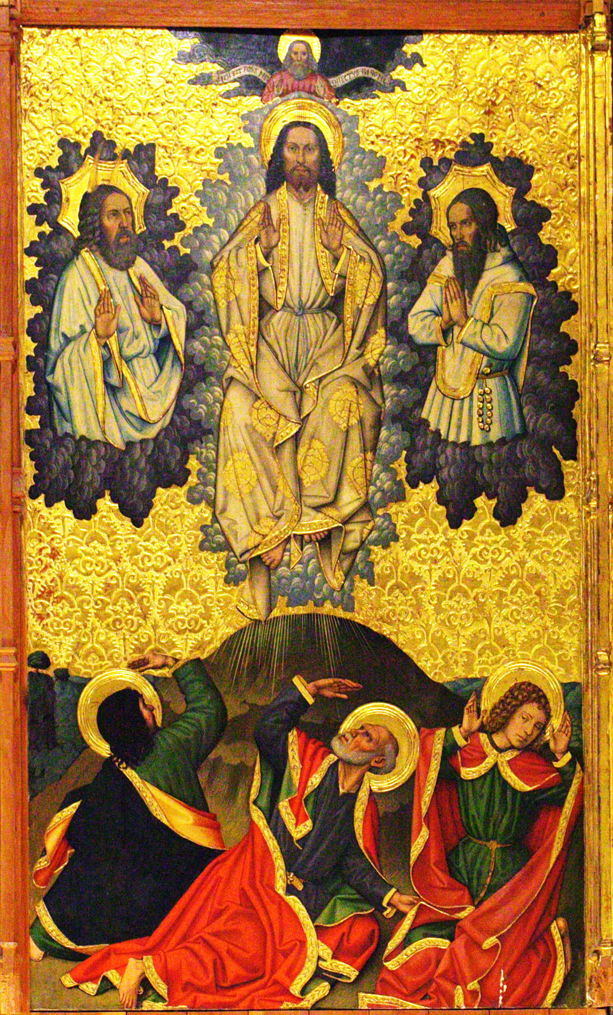 Taula central del “Retaule de la transfiguració” de Jaume Huguet a la sala de l´antic refectori dels canonges, de la catedral de Tortosa. La seva ubicació original era a la capella central de la girola, darrera l'altar major.